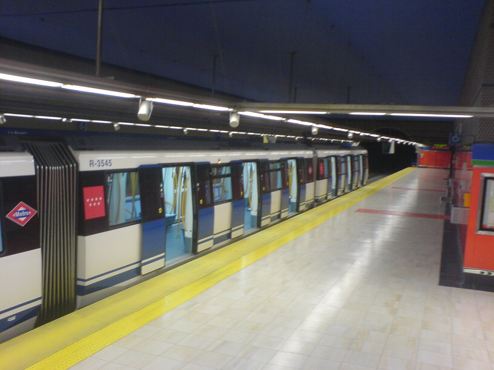 Estación de La Peseta en el Metro de Madrid